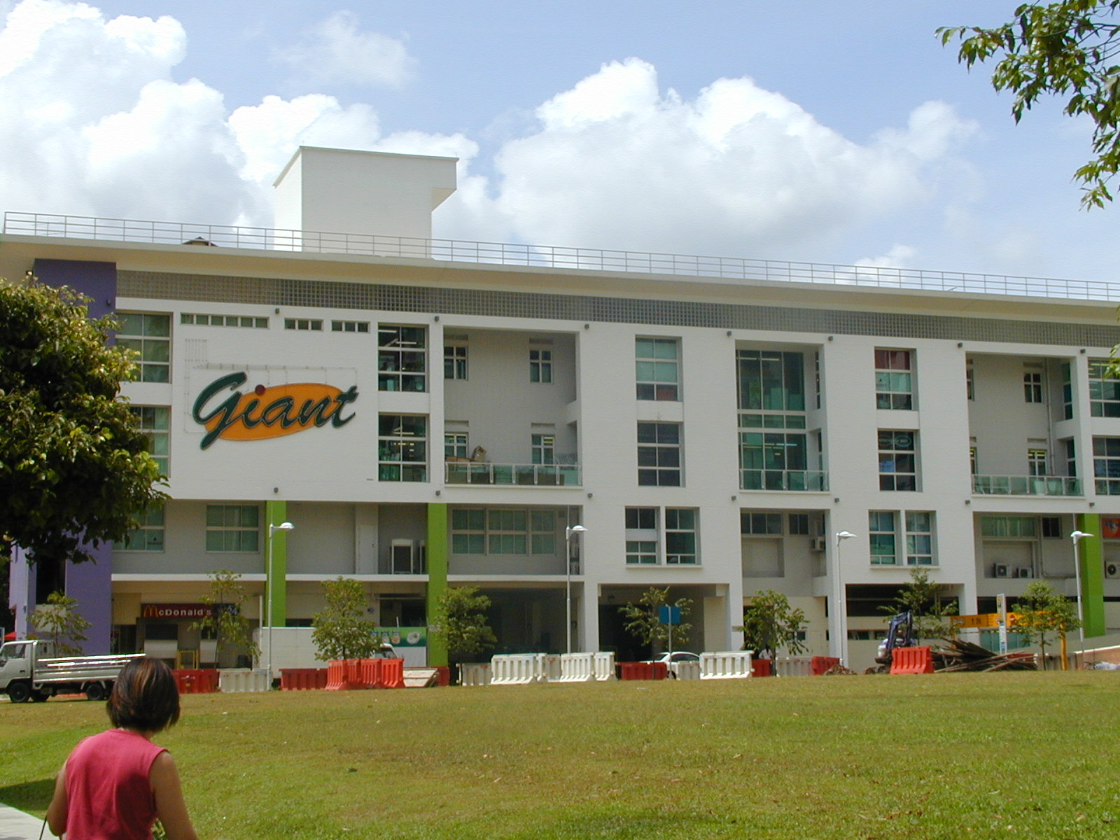 Pionner Mall. Taken by me, Wayne.